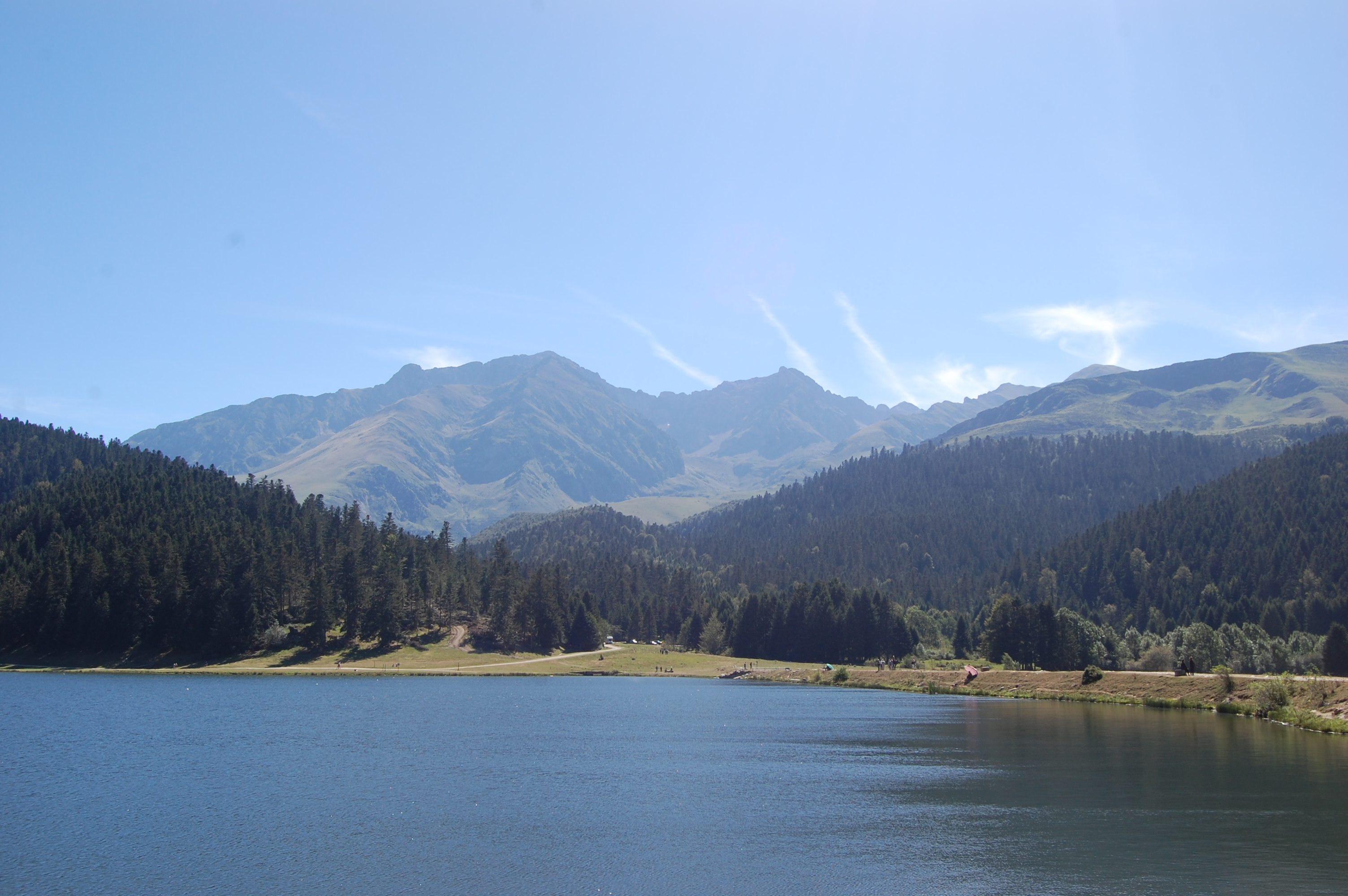 L'Arbizon et le pic de Monfaucon vus depuis le lac de Payolle